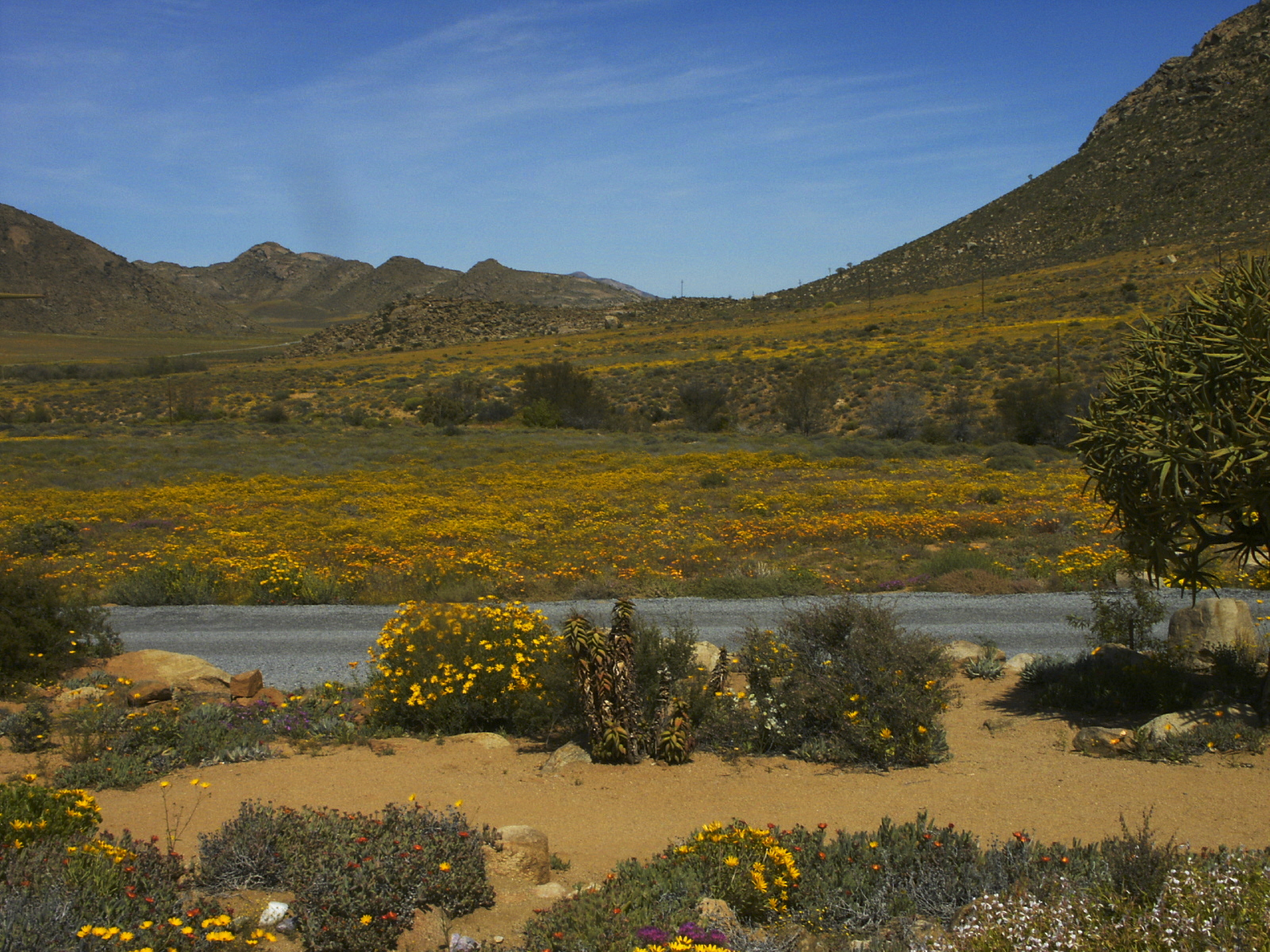 Wüstenblüte Namaqualand